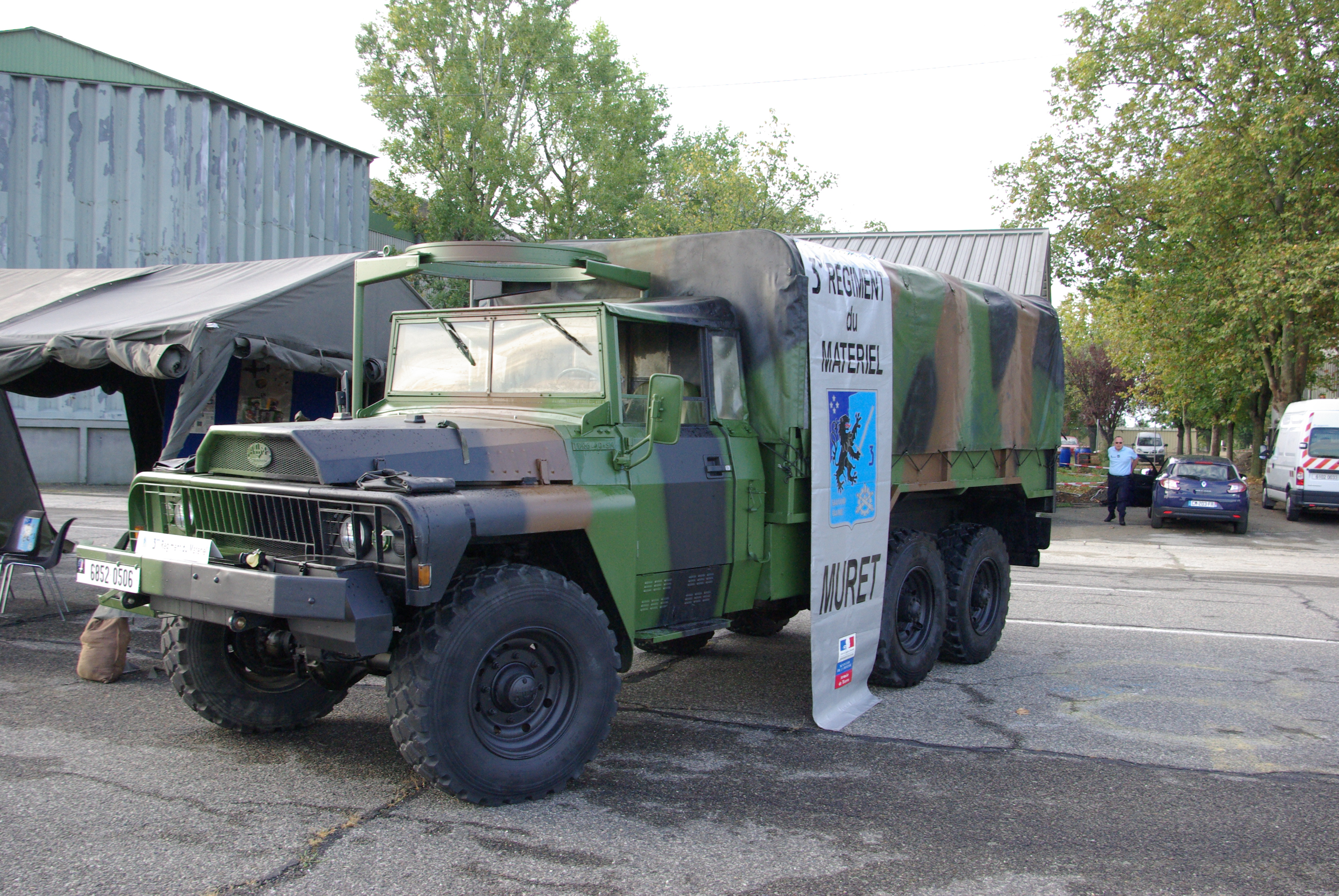 VLRA 3e régiment du matériel au meeting aérien Des Étoiles et des Ailes 2014 à Francazal.